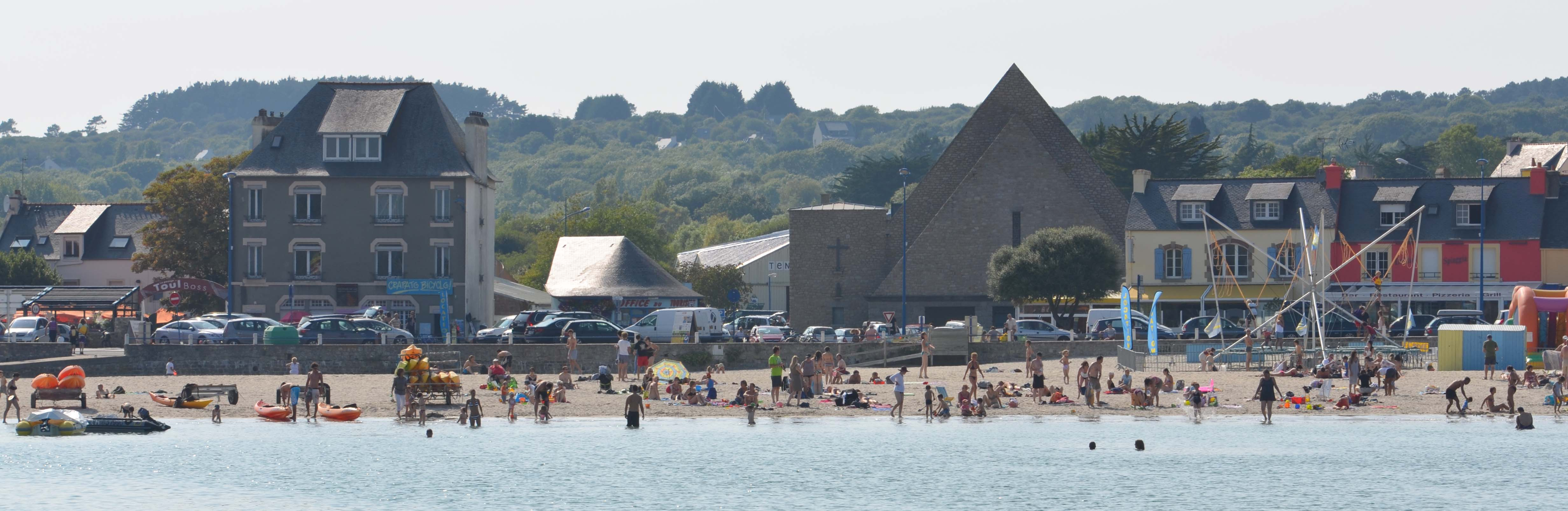 Partie de la plage de Morgat (Finistère, Ouest de la France) située devant la place d'Ys et l'église, à marée haute. Cette partie de la plage était autrefois plus de 1m (voire 2m) plus basse. Le niveau de sable y monte régulièrement, suite à une modification des courants de l'Anse de Morgat, modification engendrée par la construction du second port puis du troisième port à la fin du XXème siècle. On observe depuis un dégraissement côté Crozon et un engraissement côté Morgat, ainsi que l'apparition de zone d'anaérobiose/anoxie en profondeur (sable devenu noir). La zone basse boisée visible derrière les maisons à gauche correspond à l'ancien marais, en grande partie drainé et peu à peu construit depuis les années 1930. Jusque dans les années 1960/début 1970, des milliers de civelles y remontaient encore, en passant par le tuyau (exutoire du marais) encore en service, dont le débouché est visible dans le mur qui limite la plage, mais non visible sur la photo (il serait plus à gauche)